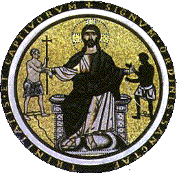 Mosaico mandado colocar por San Juan de Mata para rememorar la visión que tuvo en su Primera Misa, como signo de la Orden de la Santísima Trinidad